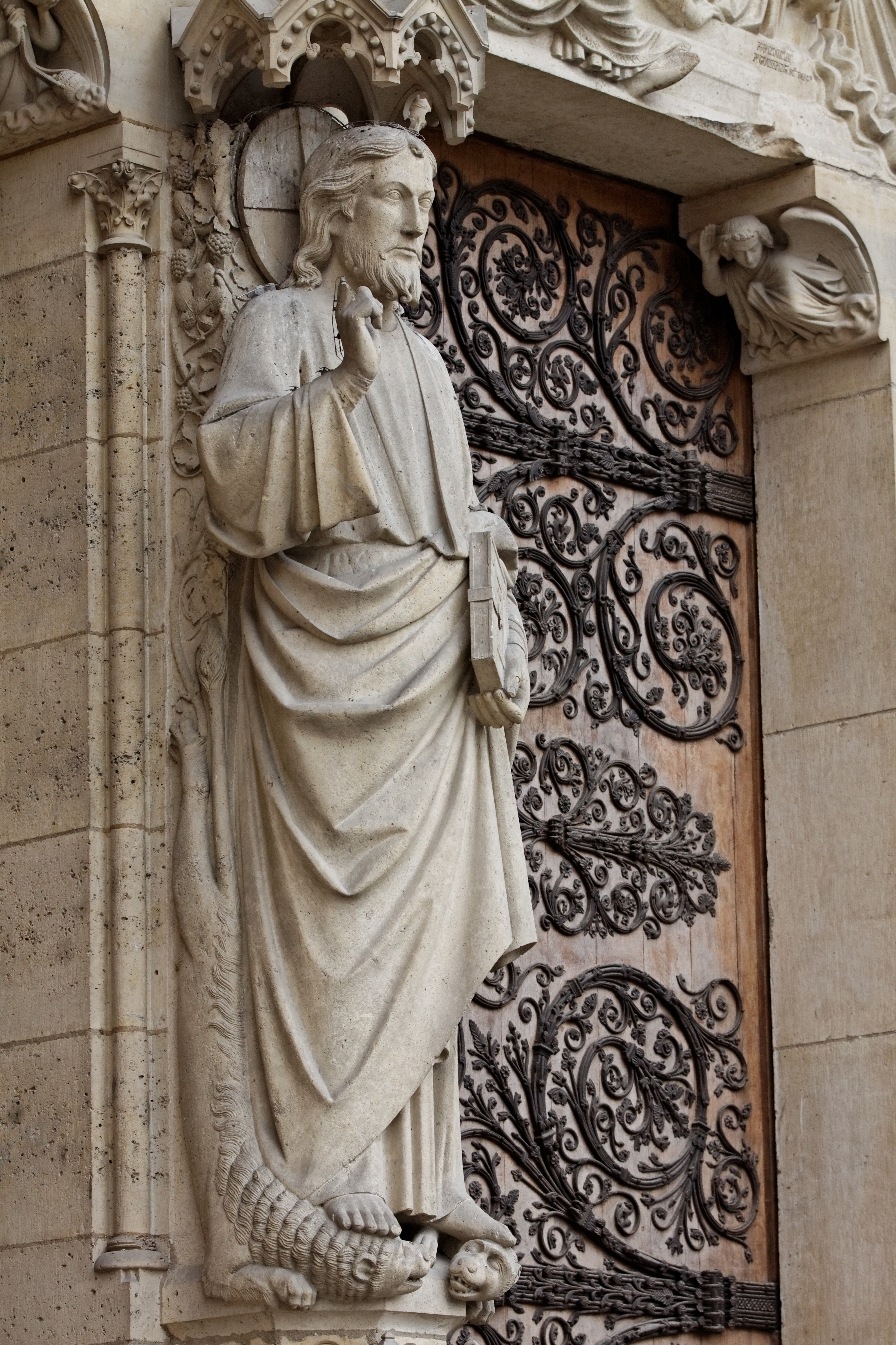 Vue d'un détail du portail du Jugement dernier sur la façade ouest de la cathédrale Notre-Dame de Paris.